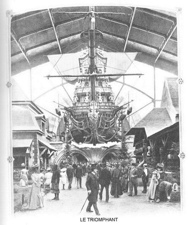 Exposición Universal de París 1900. Reproducción del navío "Le Triomphant", realizada par la promoción del Chocolat Menier en la Galería de las Máquinas